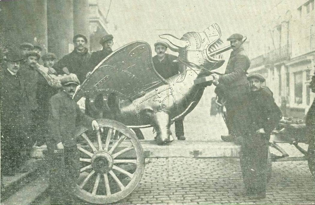 Transport du Dragon du Beffroi de Gand sur un chariot.